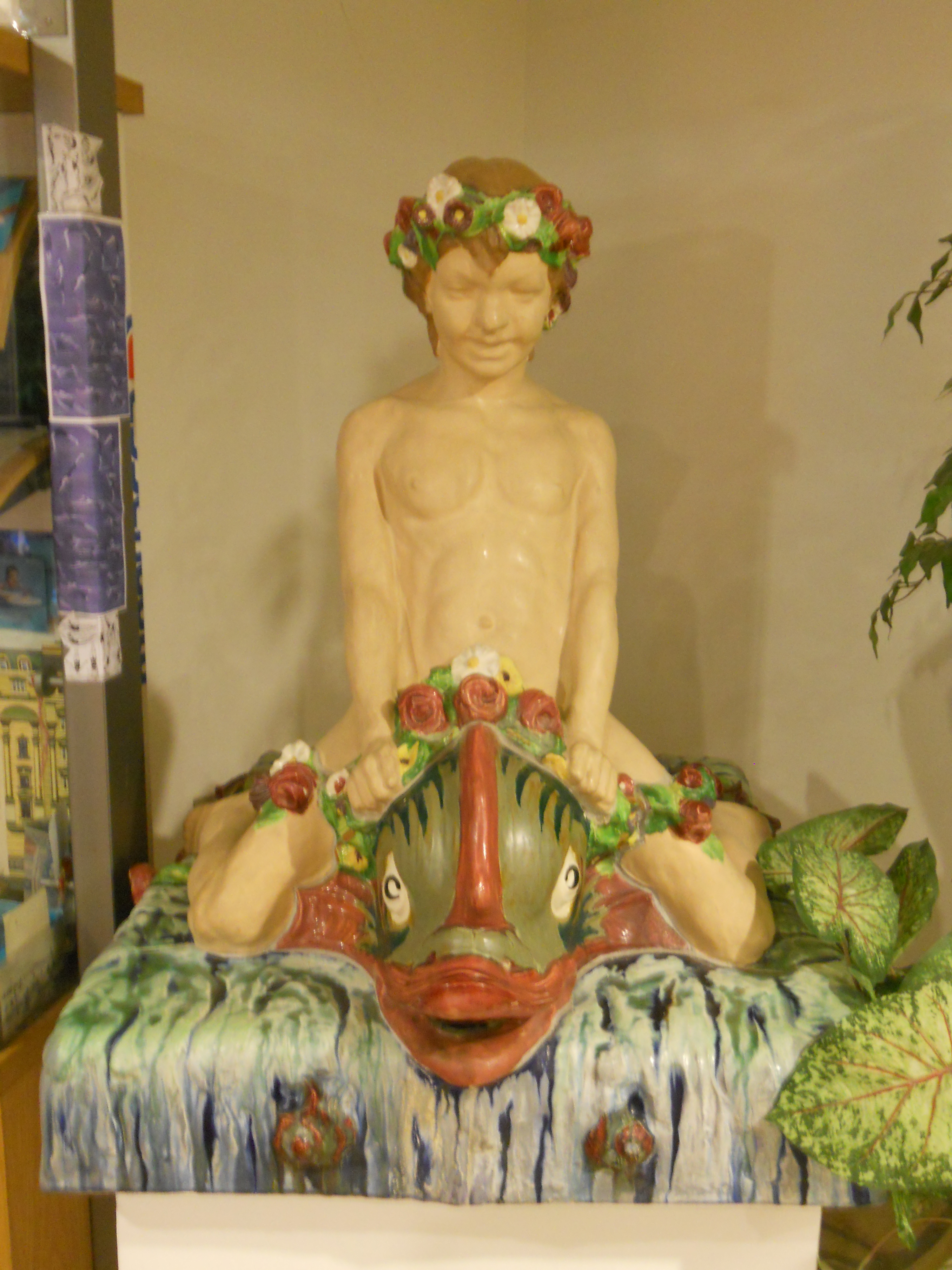 Ausstattung Dianabad (Glasmosaike, Majolikaplastik)